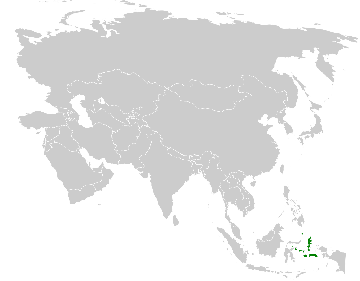 Thapsinillas distribution map